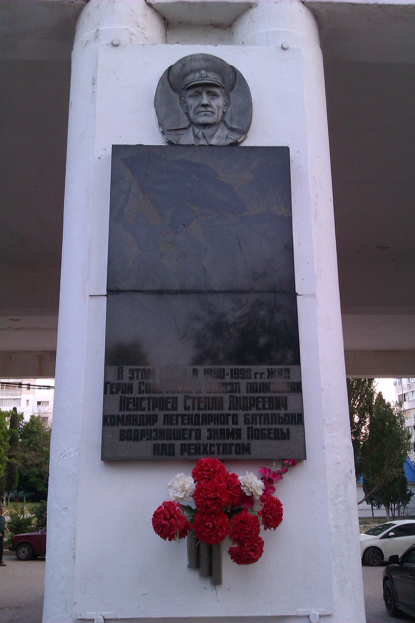 Мемориальная доска. Текст: «В этом доме в 1980—1998 гг. жил Герой Советского Союза полковник Неустроев Степан Андреевич командир легендарного батальона, водрузившего знамя Победы над рейхстагом».